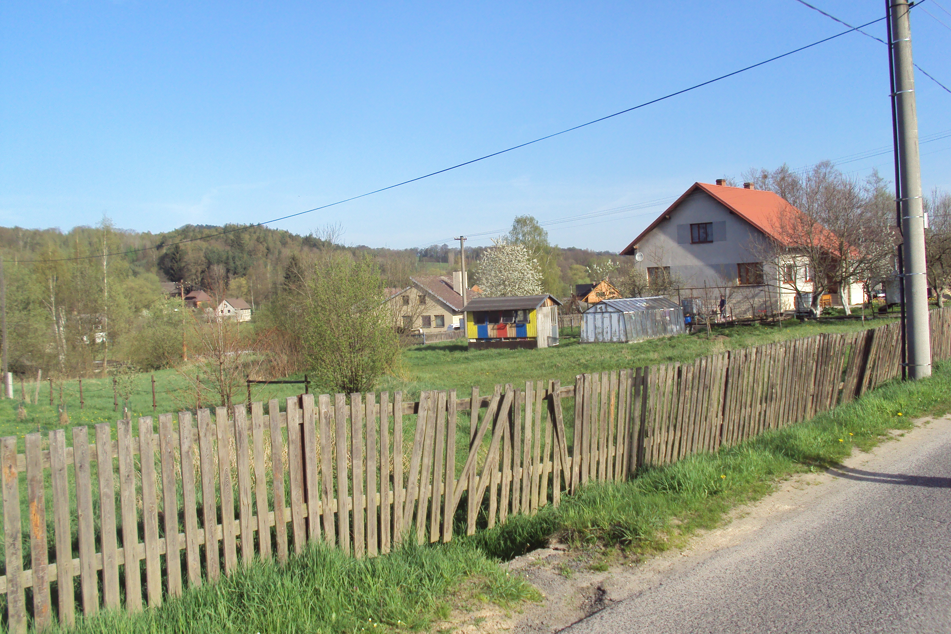 Hlemýždí je část obce Brniště